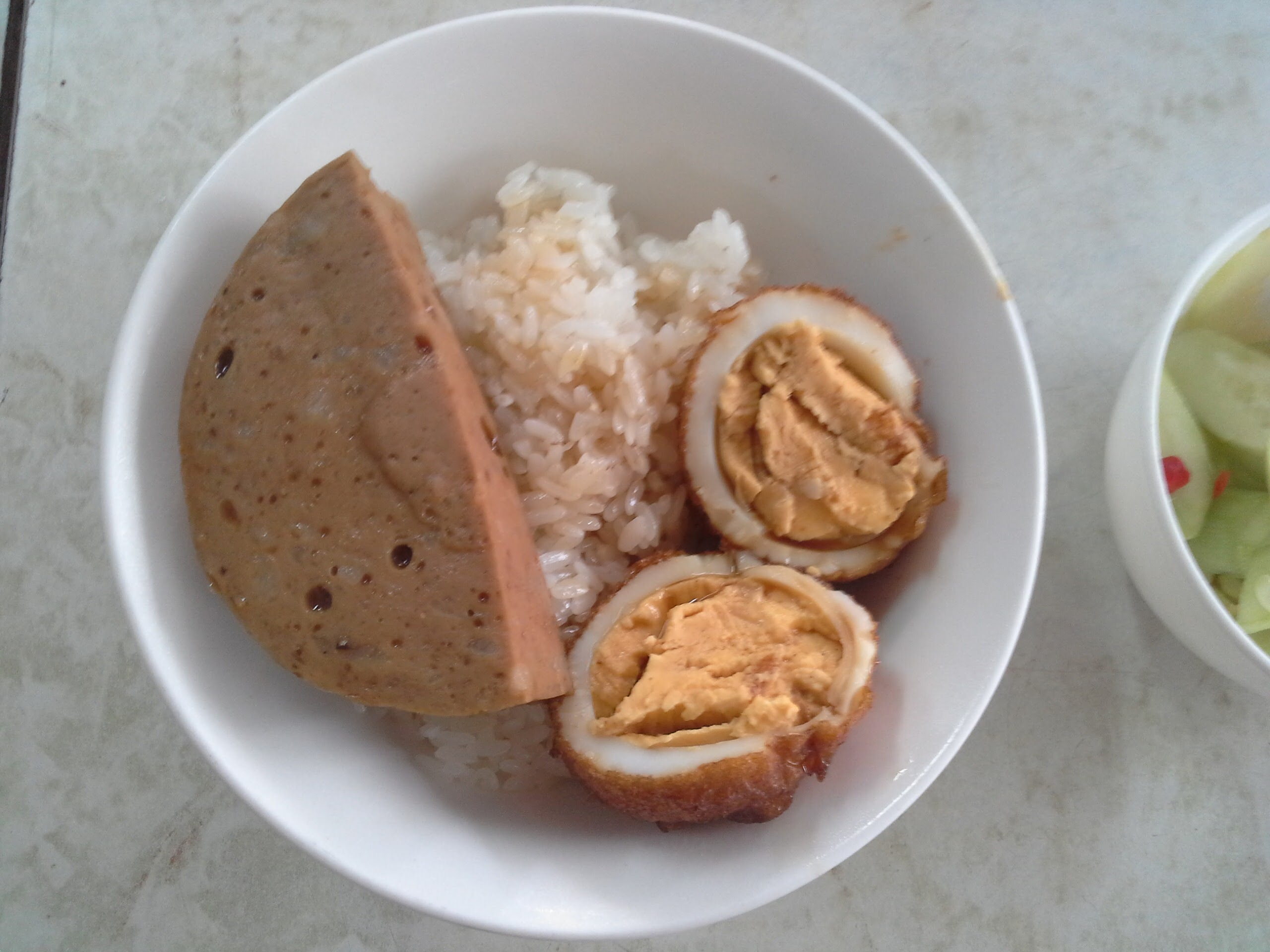 Xôi ăn kèm với giò bò, trứng, dưa chuột chua ngọt